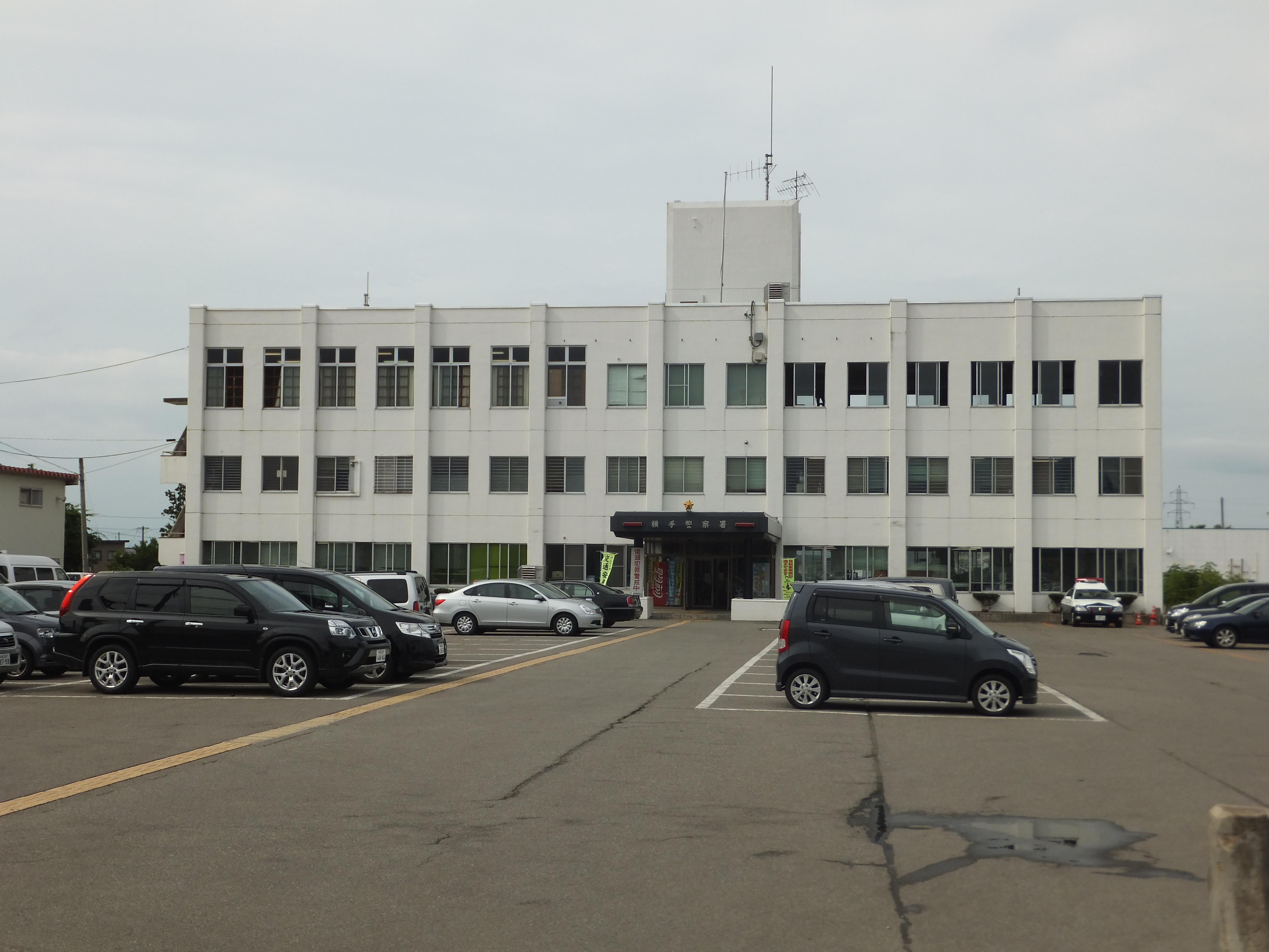 秋田県警横手警察署